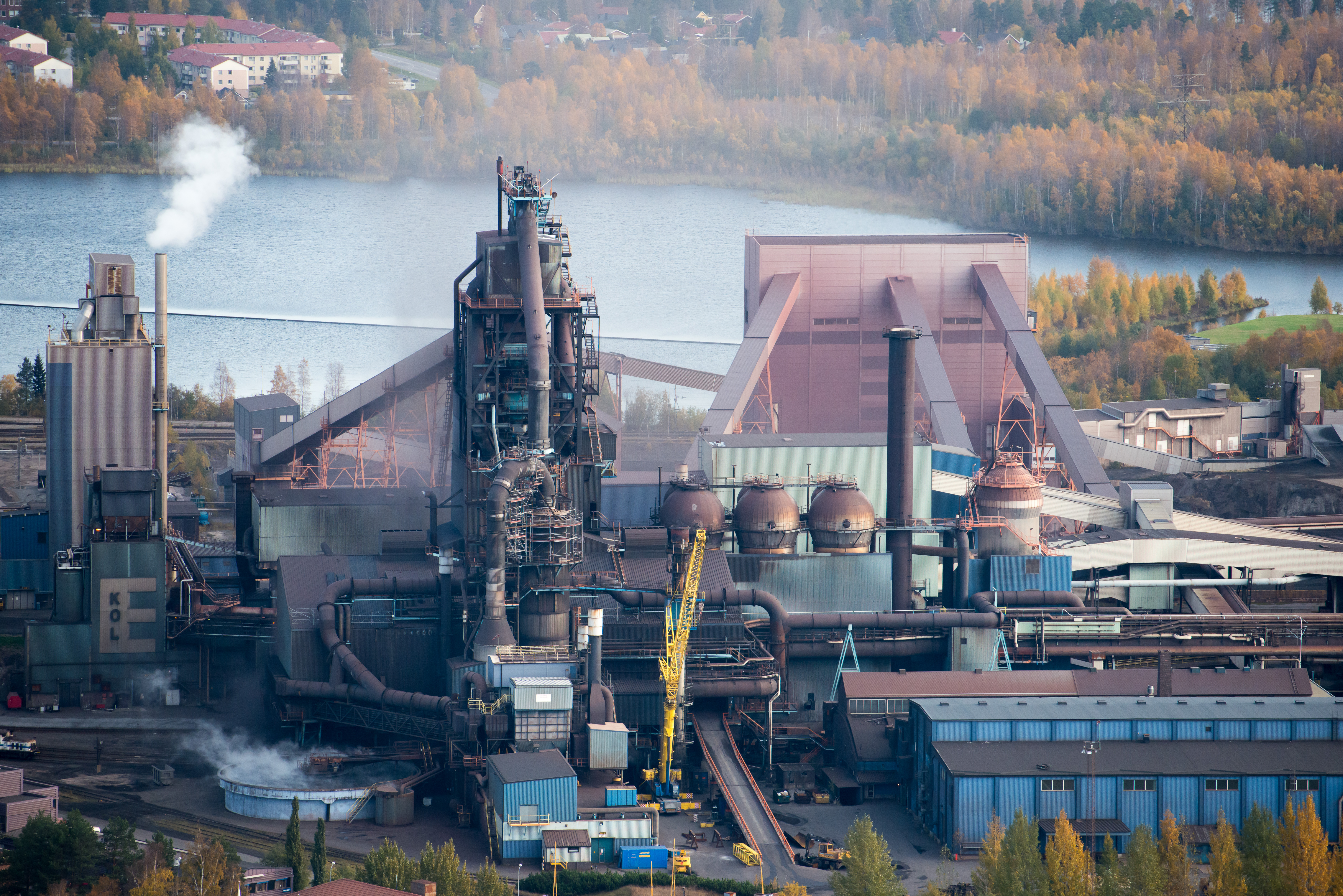 Masugnen vid SSAB i Luleå där man tillverkar råjärn till stålproduktionen.